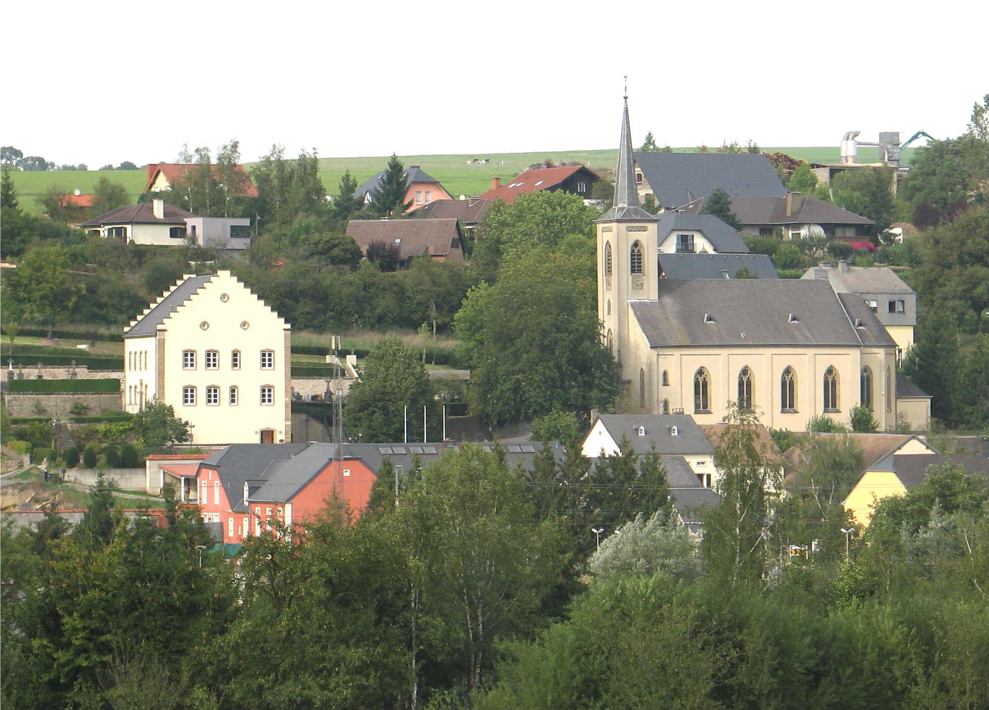 Manternach